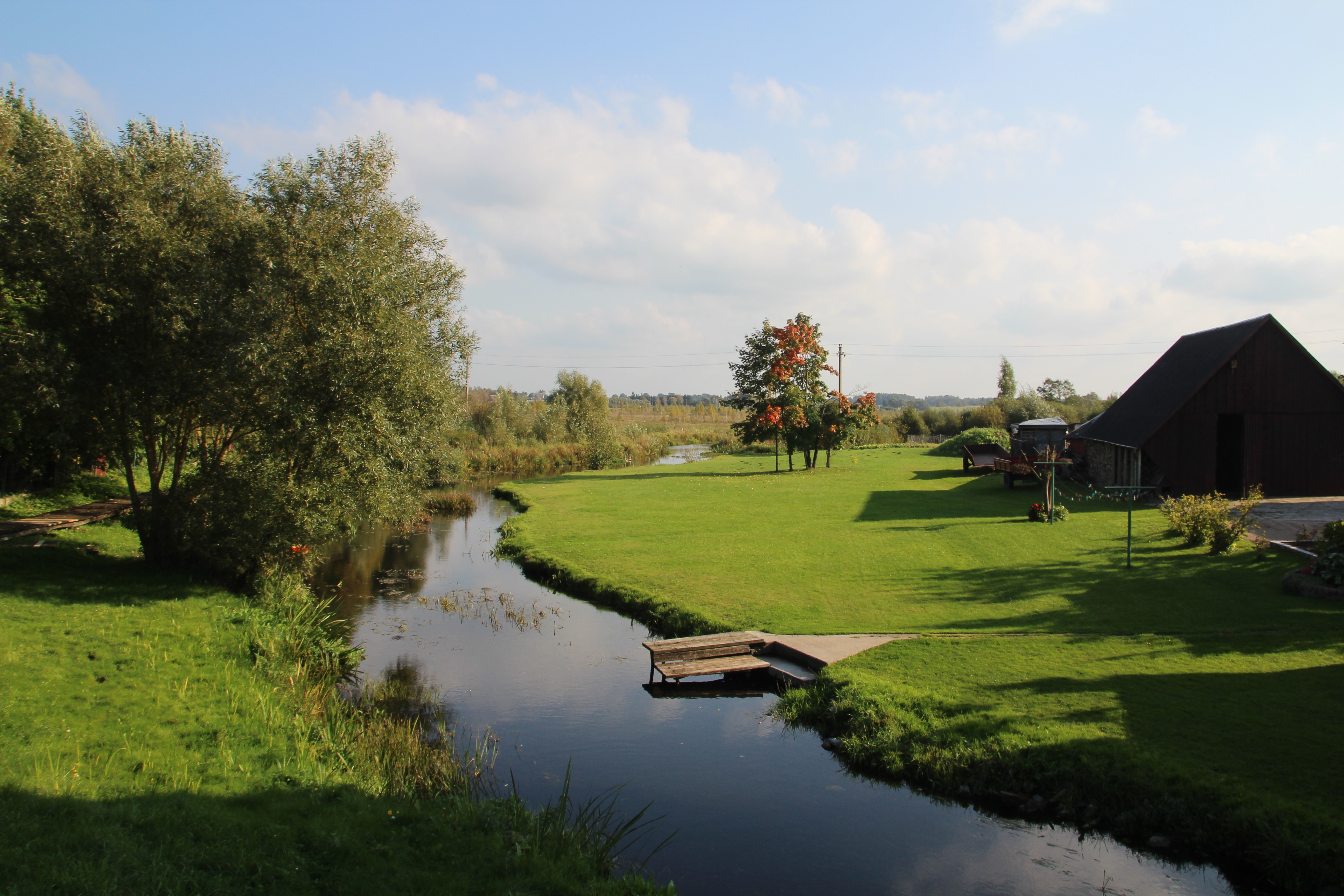 Wornie (lit. Varniai) - miasto w okręgu telszańskim na Litwie.